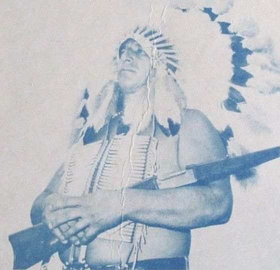 Chief Jay Strongbow sur une affiche de la 125ème foire de Brooklyn du 27-28-29 août 1976